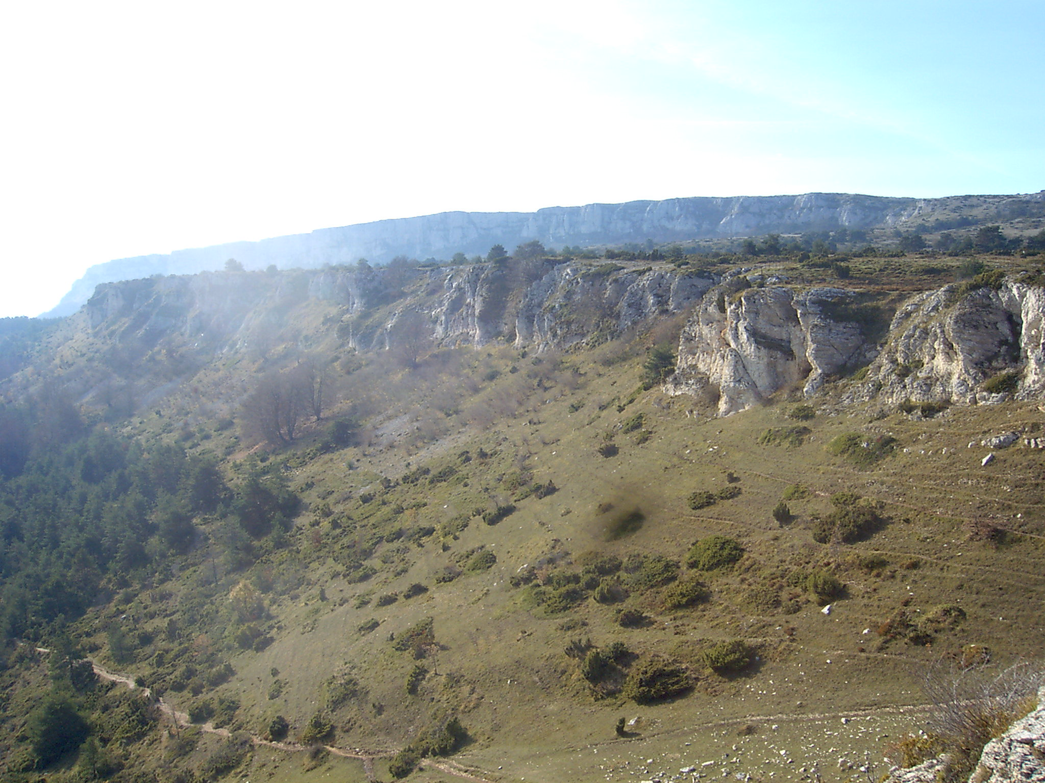 Valderejo natur parkeko baseliza